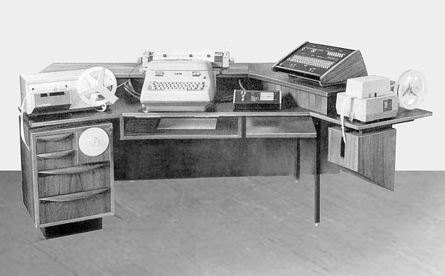 Pracoviště operátora počítače Gier